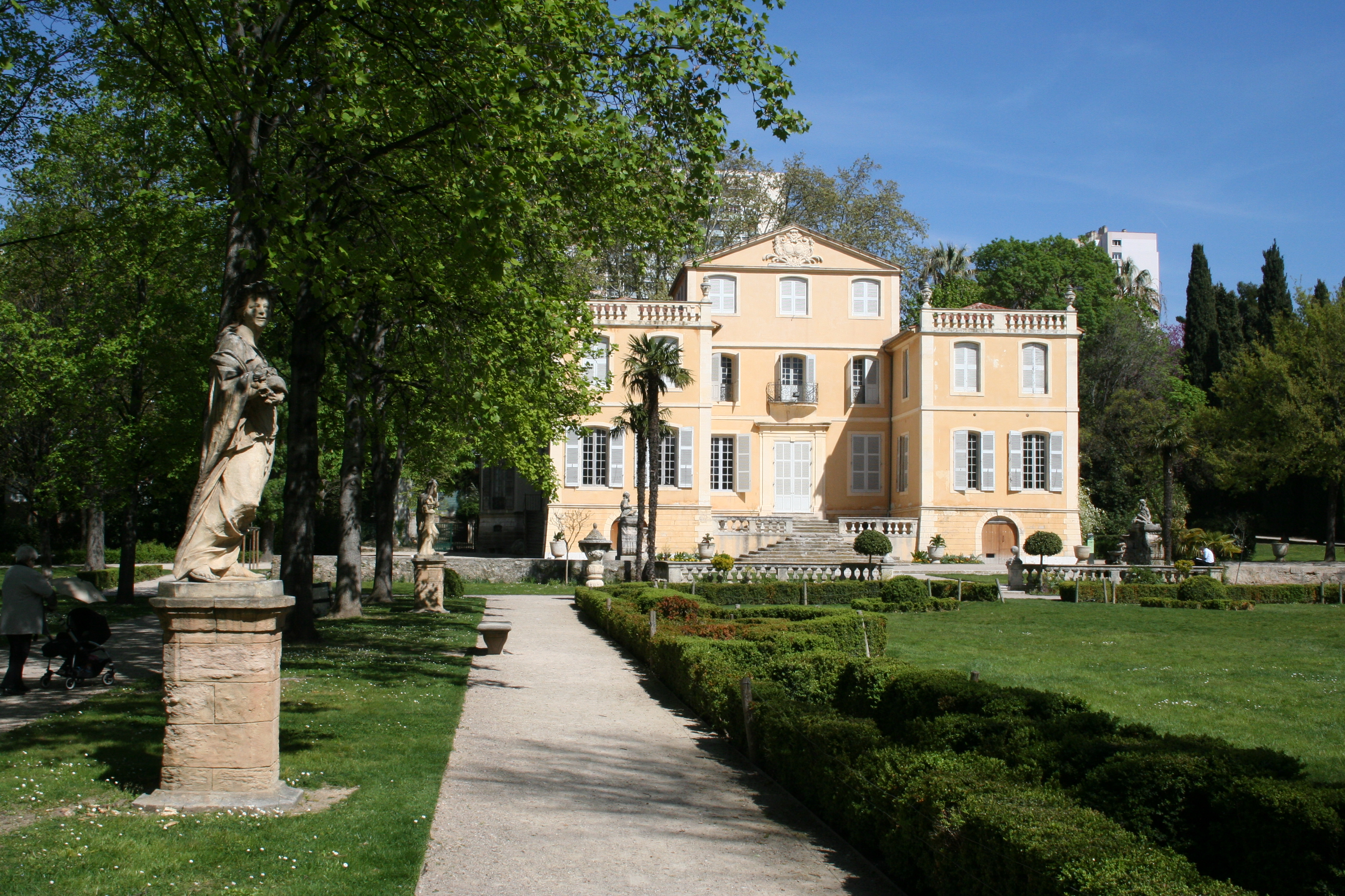 Villa Magalone inscrite aux Monuments Historiques, construite entre 1690 et 1710 et située au 245 Brd Michelet à Marseille.